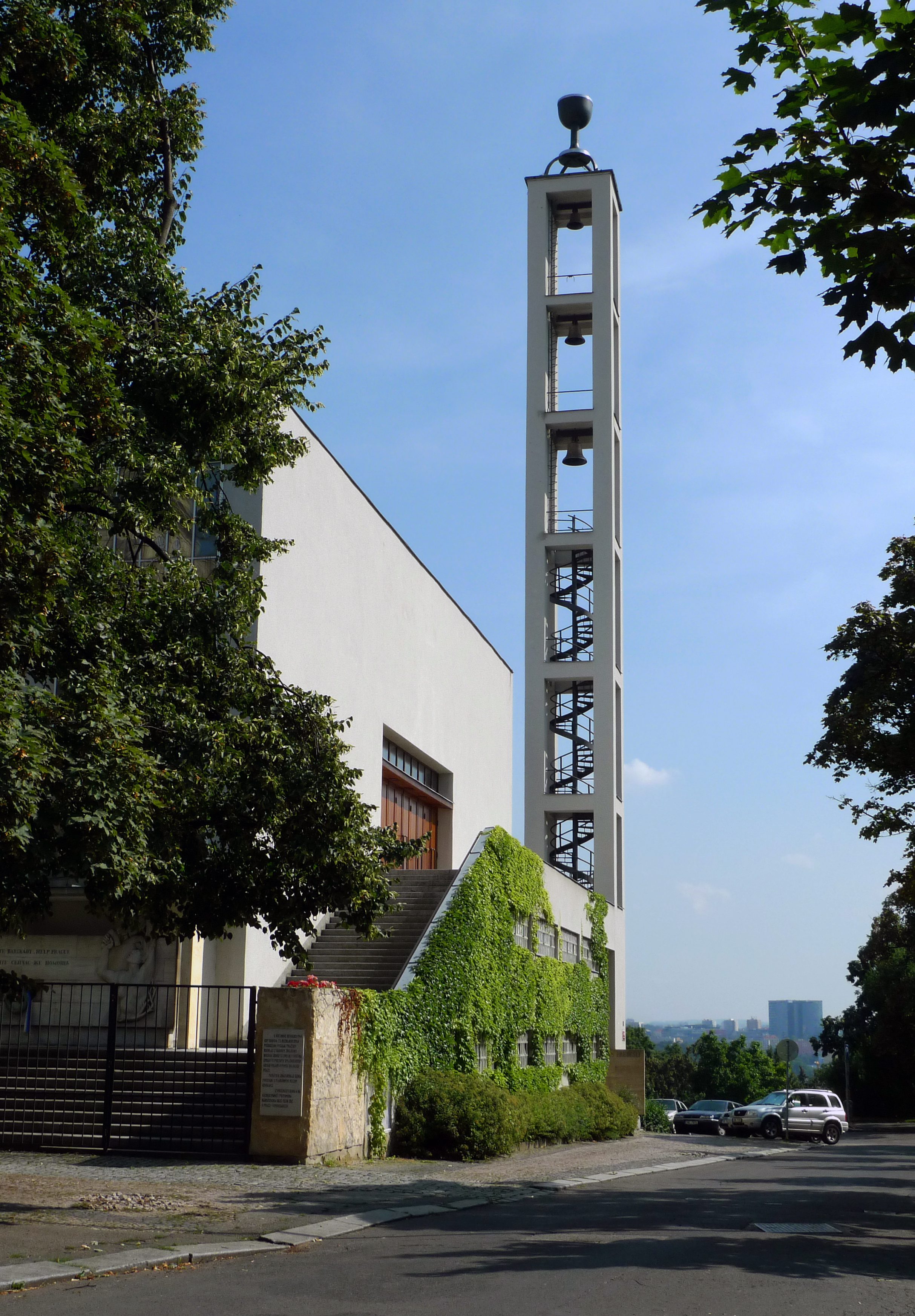 Husův sbor v Praze na Vinohradech